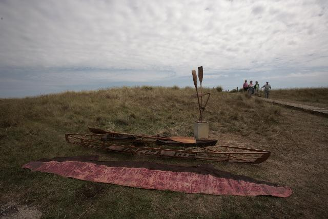 Monument ter herdenking van 32 Engelandvaarders die per kano zijn overgestoken, initiatief van Henri Peteri.